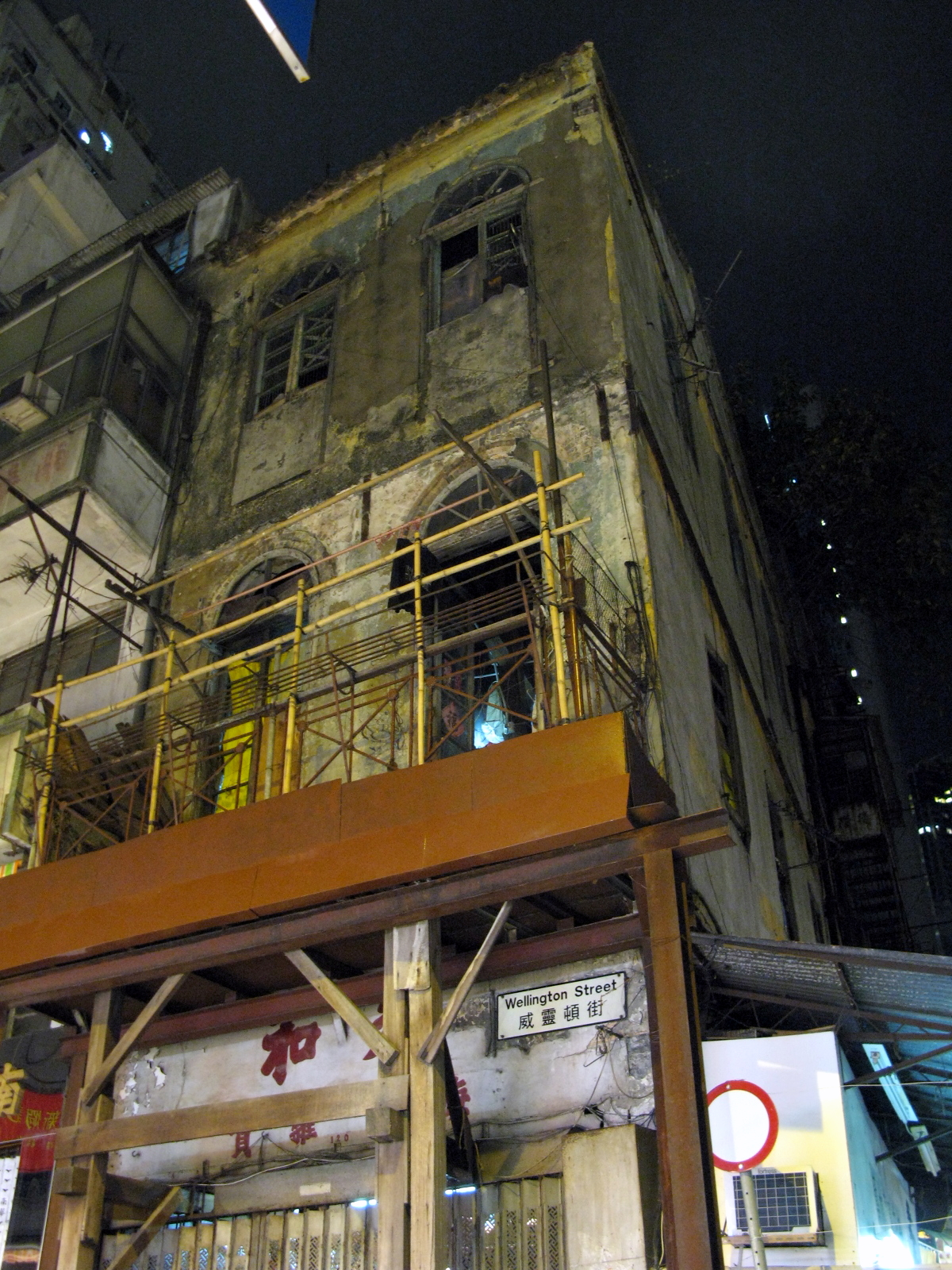 Wing Wo Ho 永和號 (威靈頓街120號)